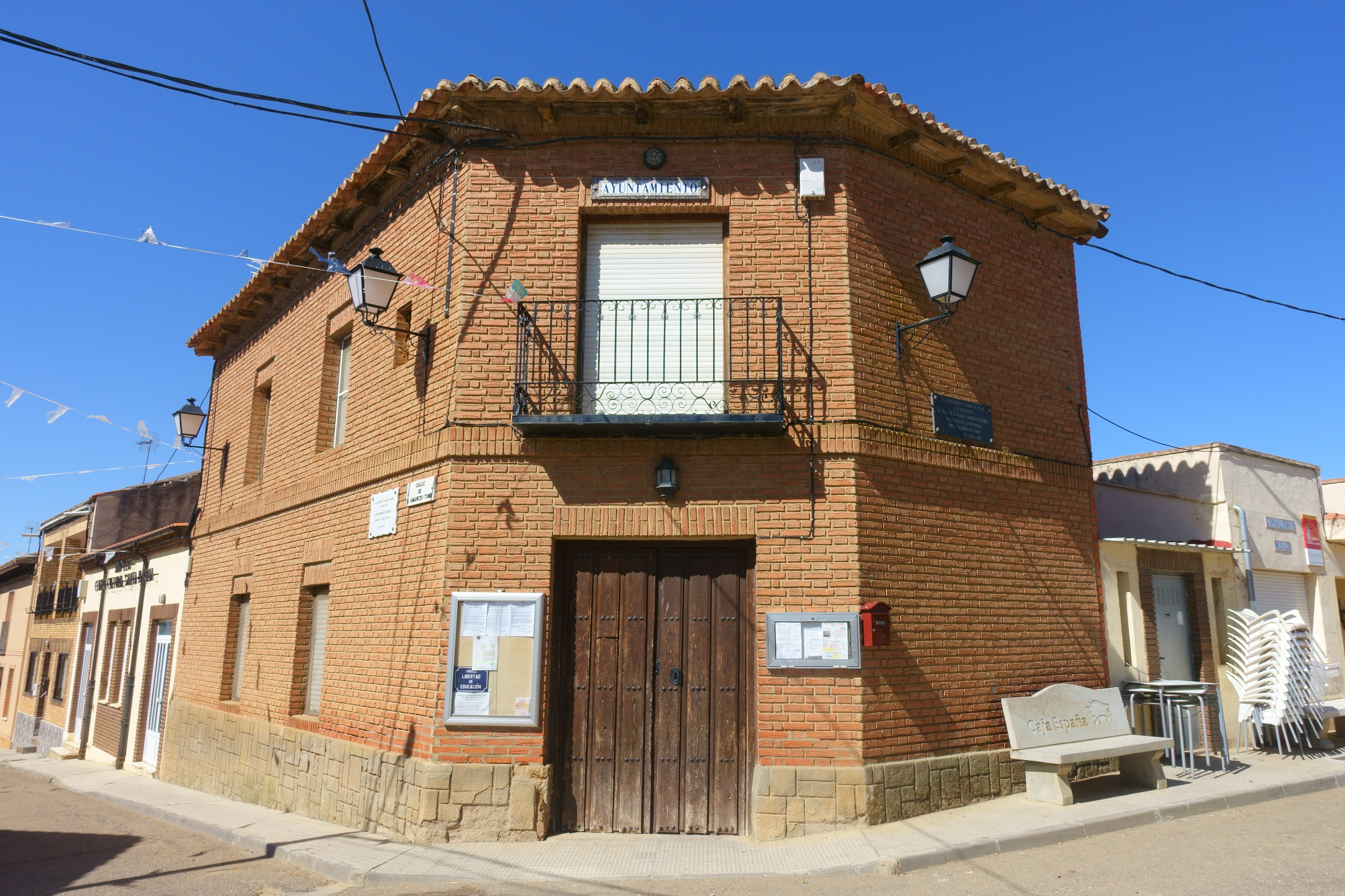 Casa consistorial de Prado (Zamora, España).